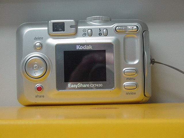 Appareil photographique numérique Kodak EasyShare CX7430- Vue arrière